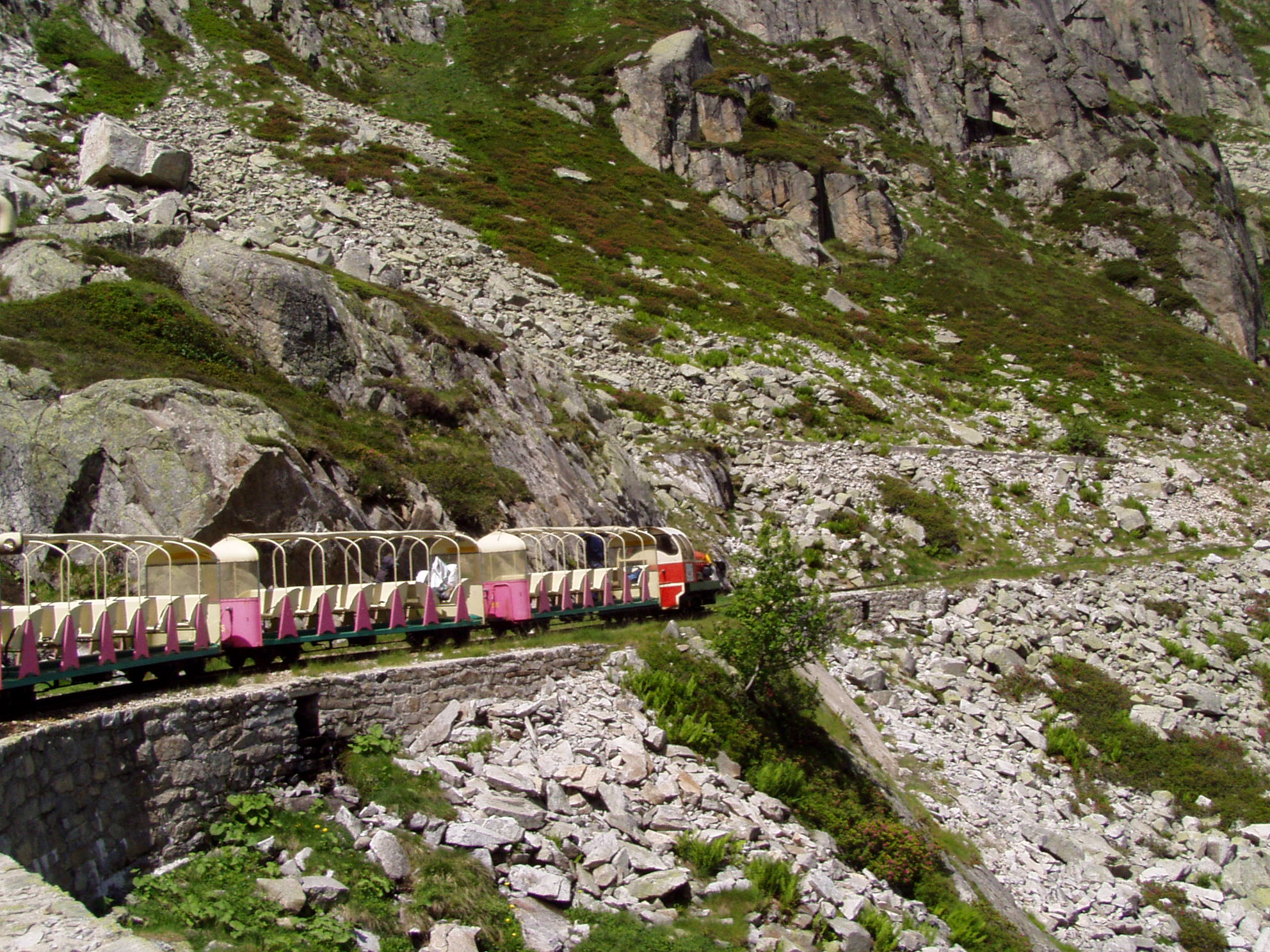 Photographie du petit train d'Artouste (Pyrénées-Atlantiques) prise du train